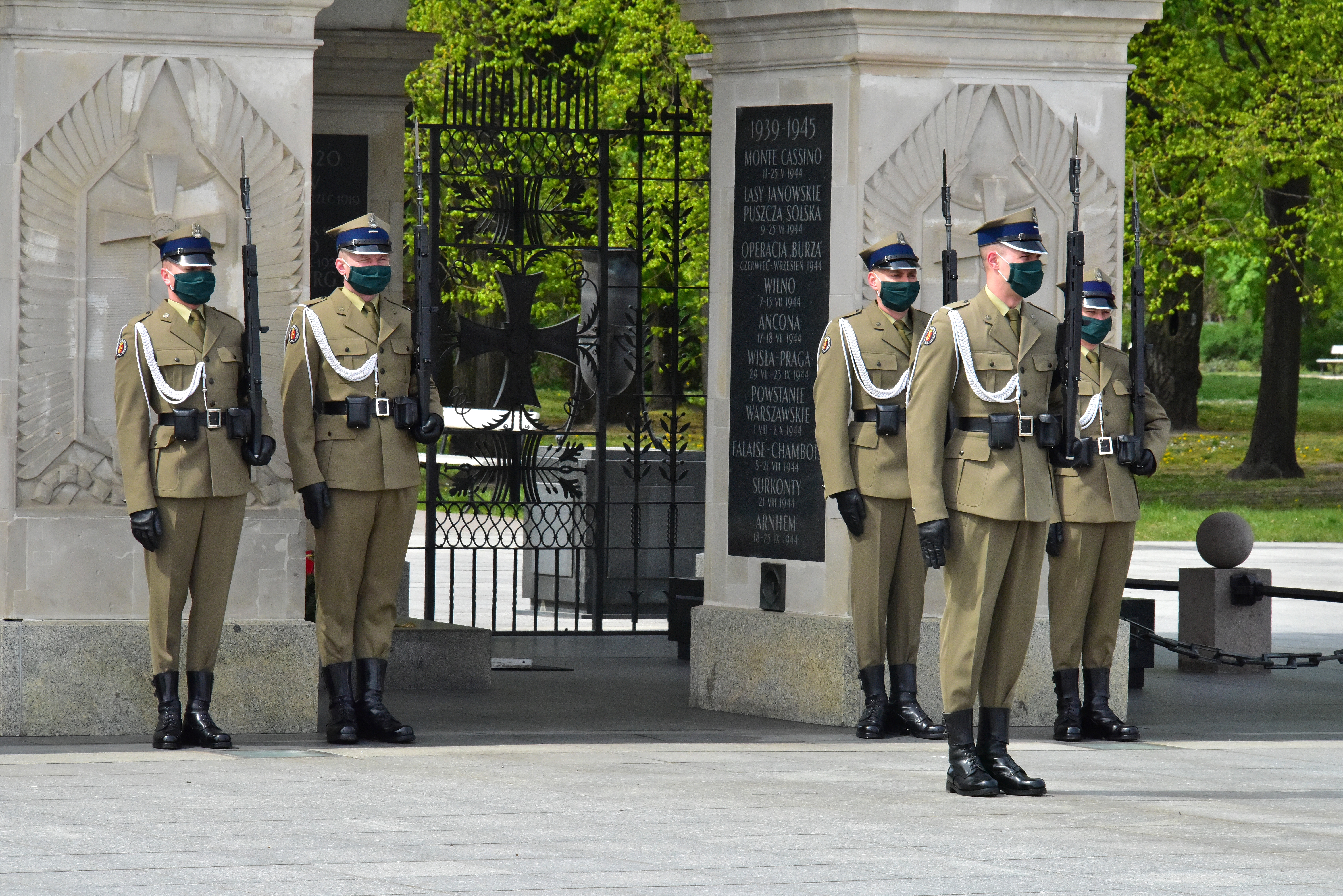 Pandemia COVID-19 w Polsce. Zmiana warty przed Grobem Nieznanego Żołnierza w Warszawie